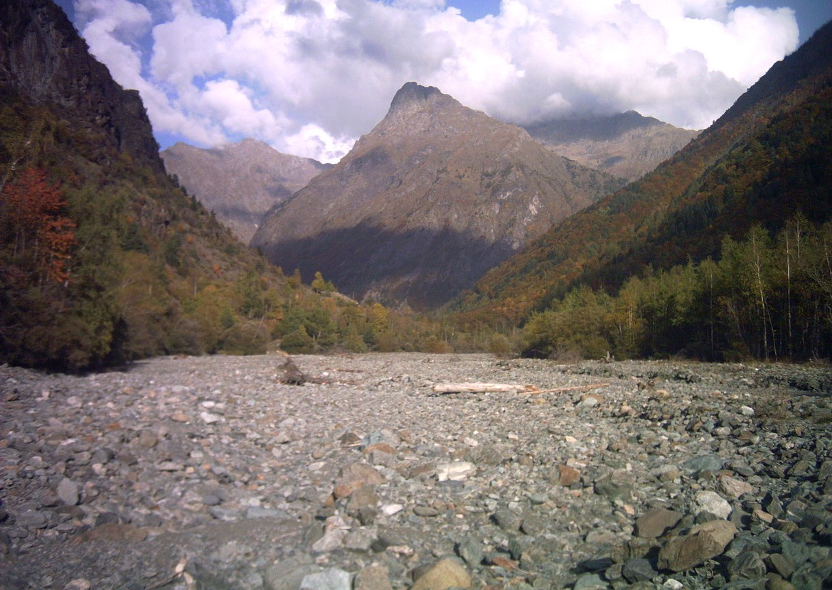 La Séveraissette à sec en fin d'été en aval de Molines. Comparer avec la même vue en mai (file:Séveraissette-08.JPG, dans cette même catégorie).